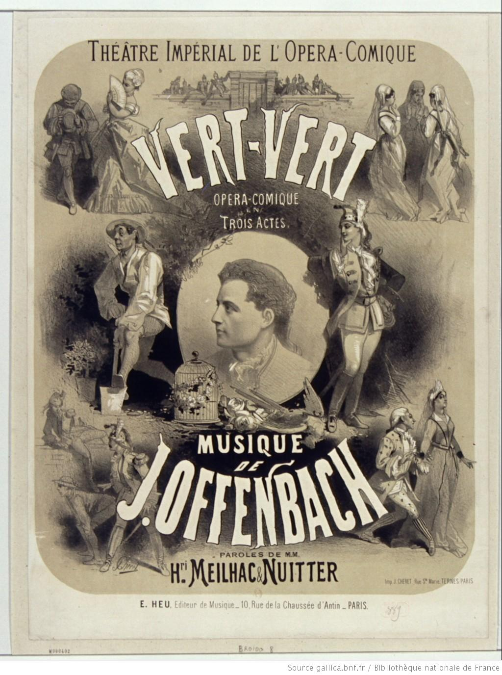 Affiche de Jules Chéret pour la création de Vert-Vert à l'Opéra-Comique